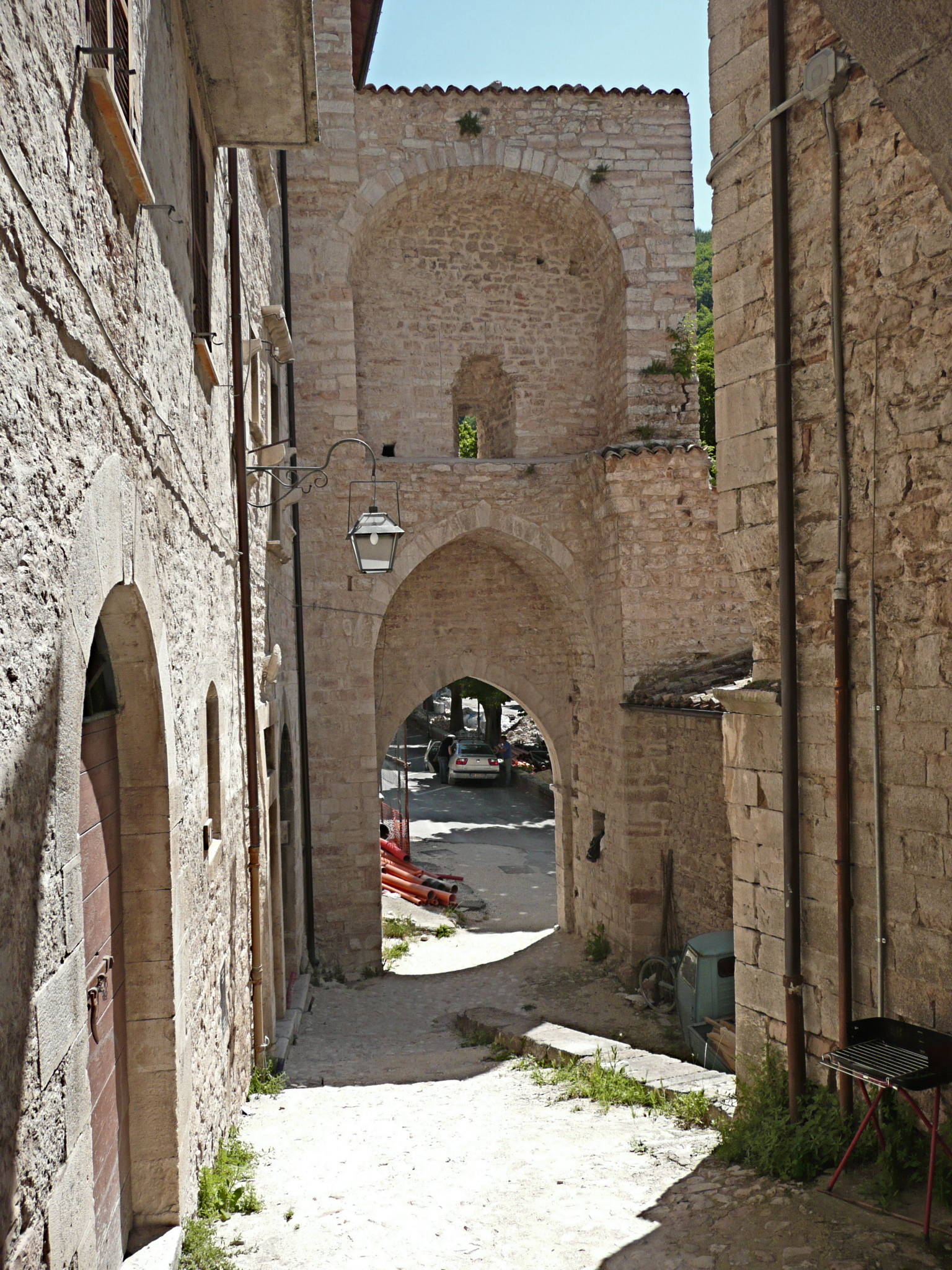 Visso, centro storico